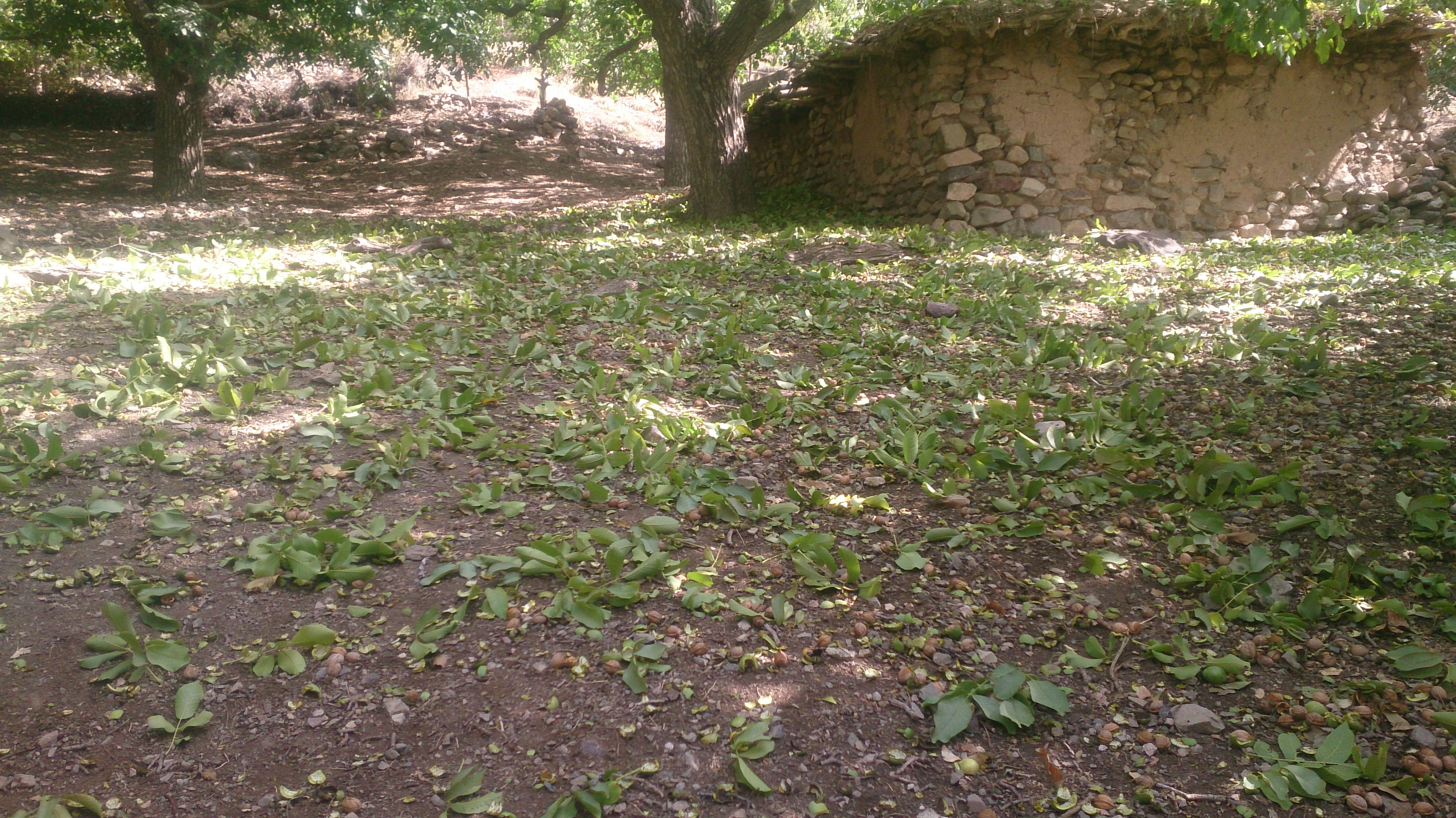 برداشت گردو (گردو تکانی) در روستای دامنه